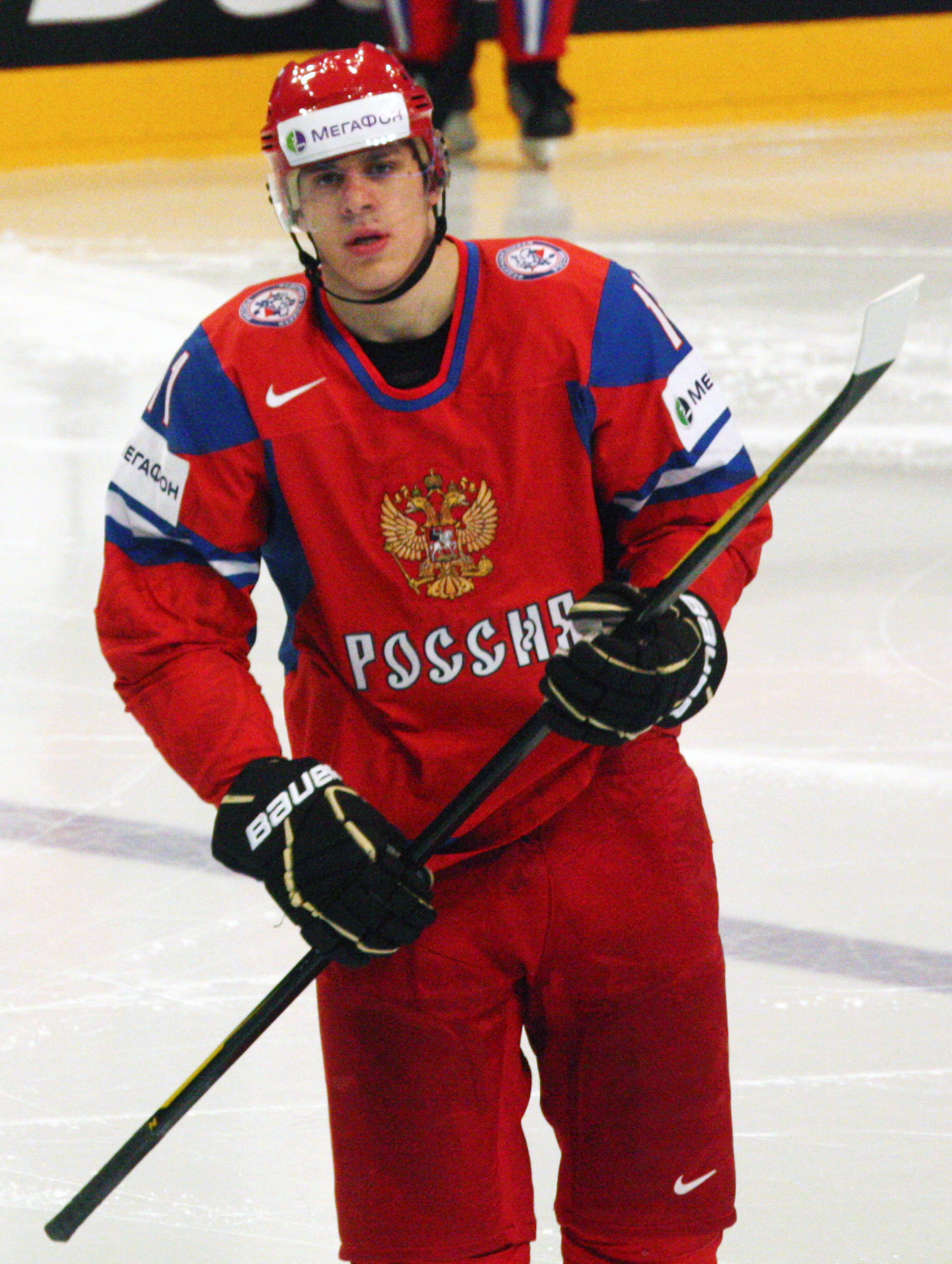 Евгений Малкин, ЧМ 2012, 13.05.2012 Россия-Чехия, Стокгольм, Швеция.